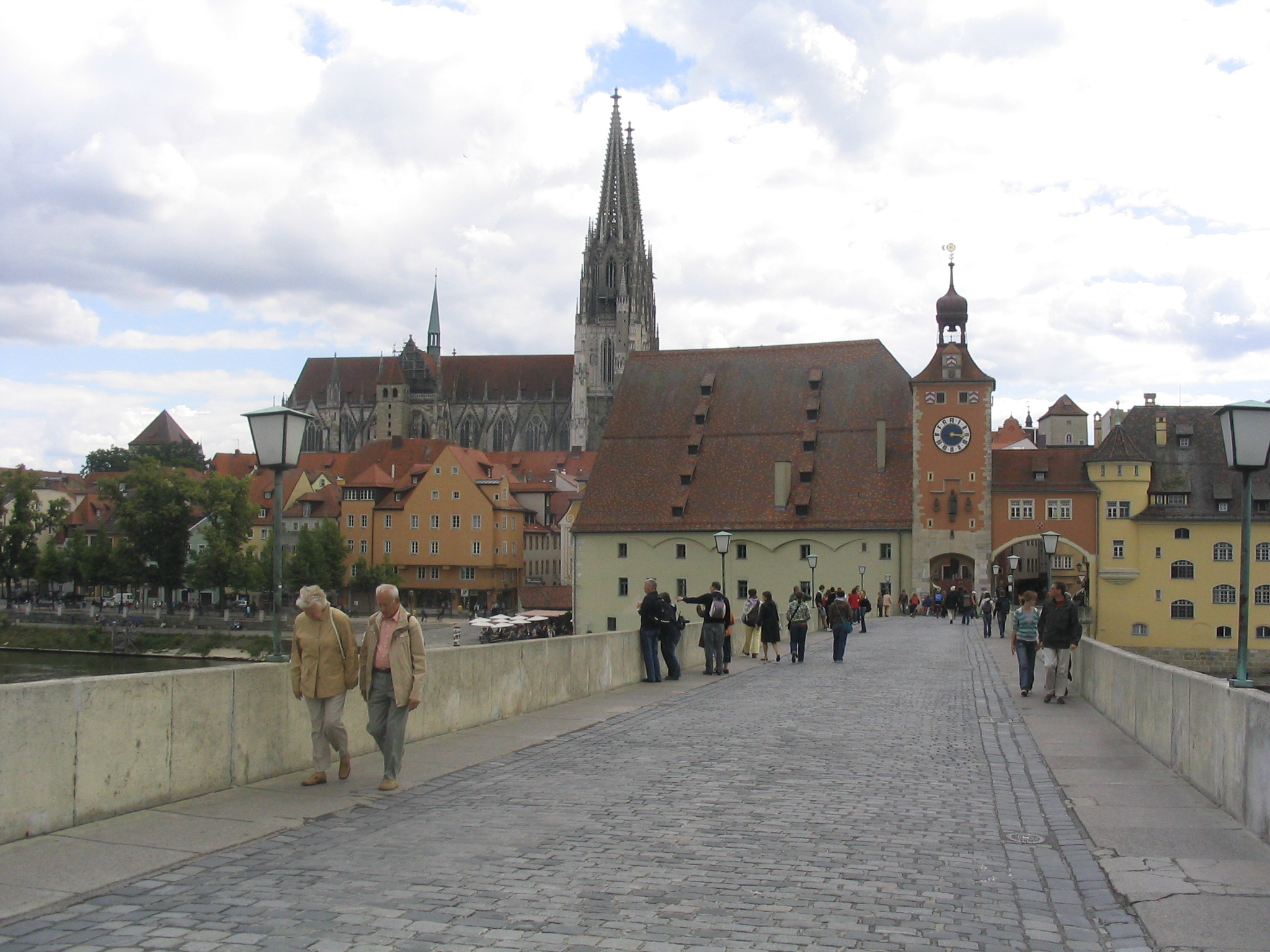 Steinerne Brücke in Regensburg. Blick zum Salzstadl Aufgenommen am 30.07.2007 von Dr. Hagen Graebner